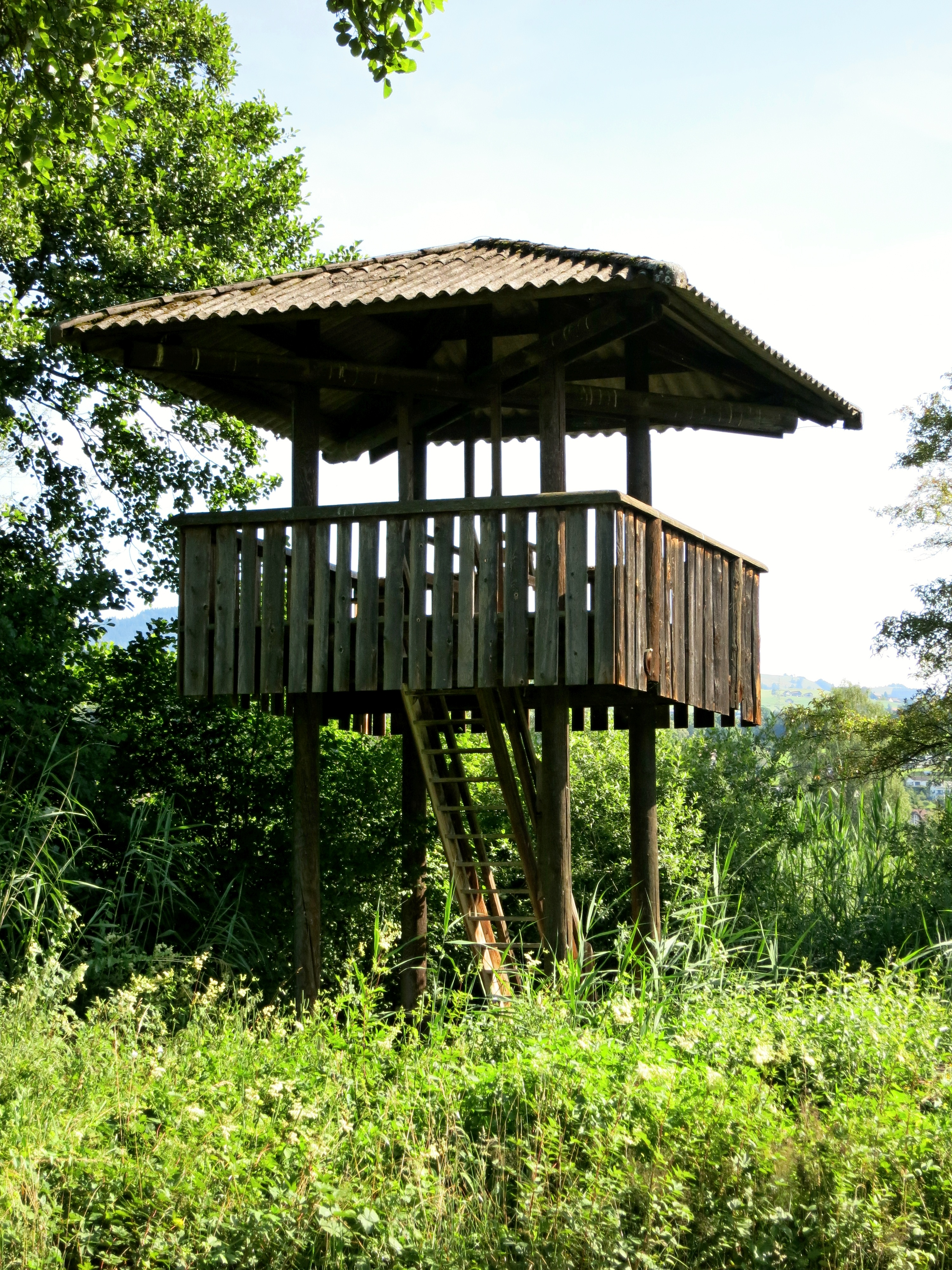 Kaltbrunner Ried Turm klein